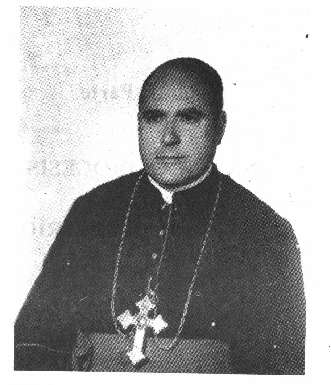 Monseñor González Ibarra